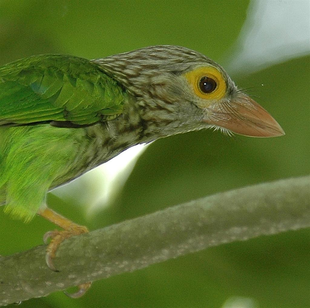 Lineated Barbet Megalaima lineata